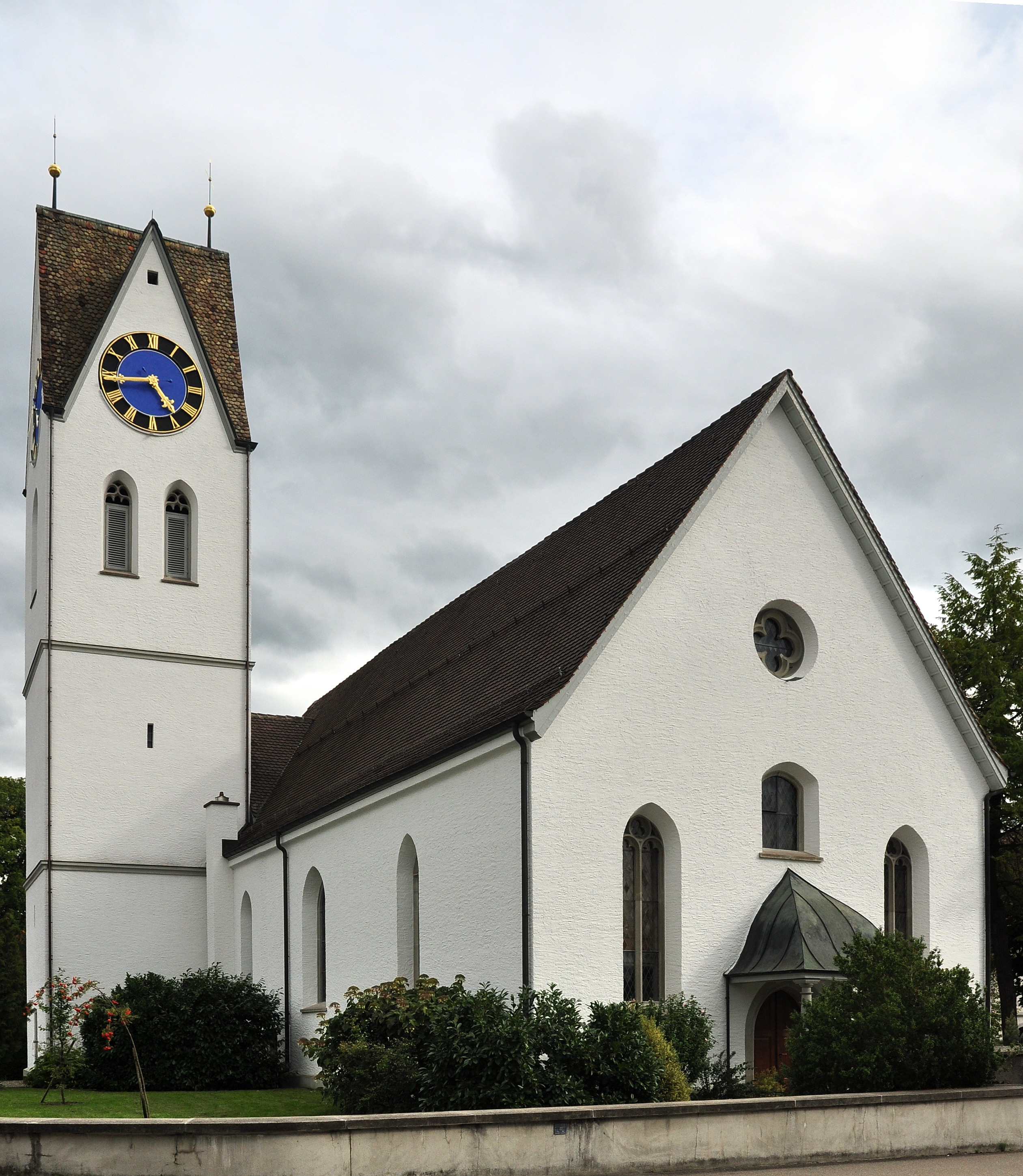 Reformierte Kirche, Oberdürntnerstrasse in Dürntern (Switzerland)